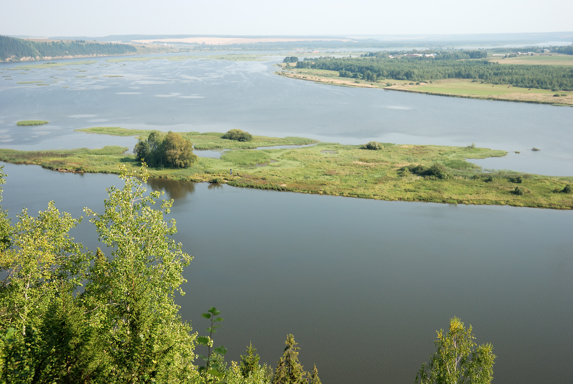 Chusovaya, Summer, 2007